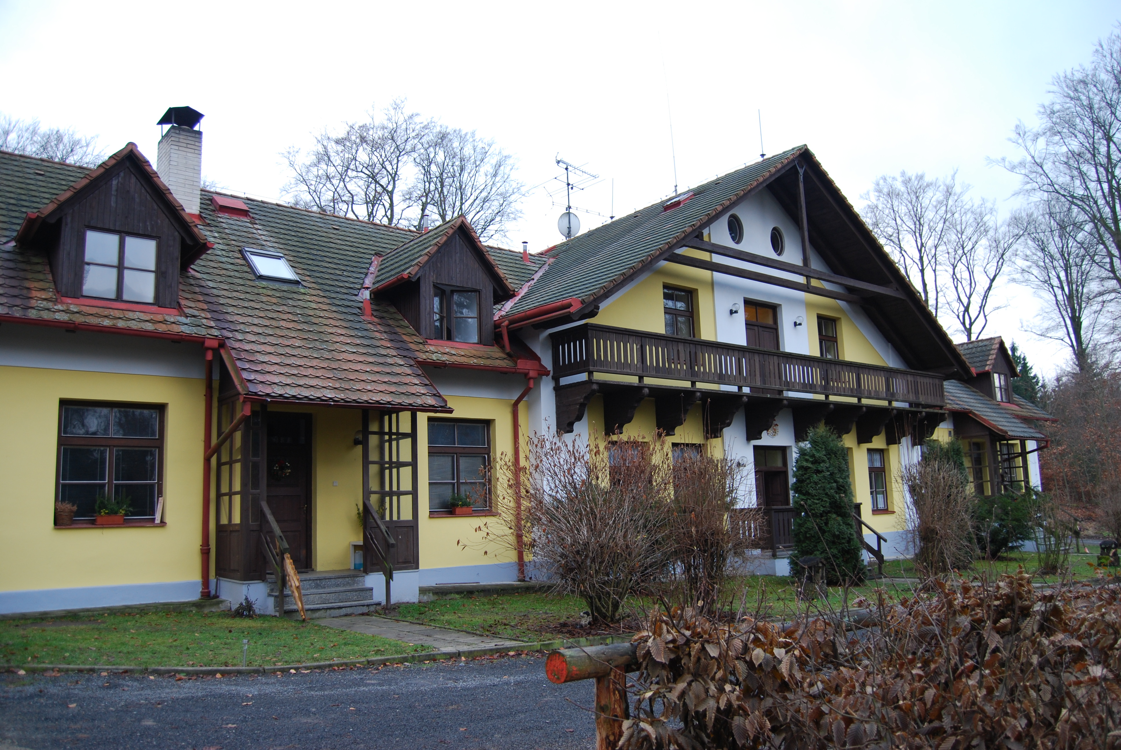 Bývalá hajnice. Rukávečská obora, zvaná též Květovská obora. Rukáveč - část města Milevsko v okrese Písek. Česká republika.